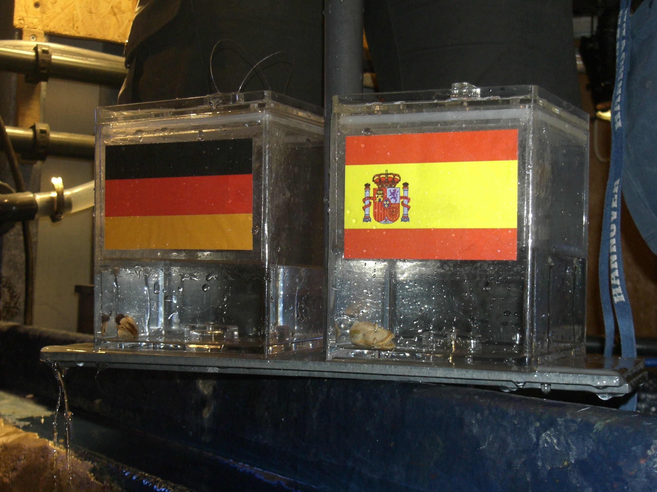 WM-Behälter des Oktopus-Orakels Paul.